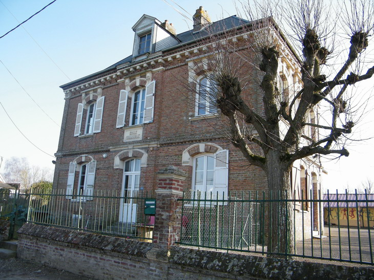 L'école-mairie accueille une des classes du regroupement pédagogique. L'école ferme aux grandes vacances 2019.